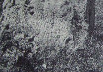 Menhir du Vieux-Poitiers, commune de Naintré, dans la Vienne. Monument historique. Photographie de Jules Robuchon. .